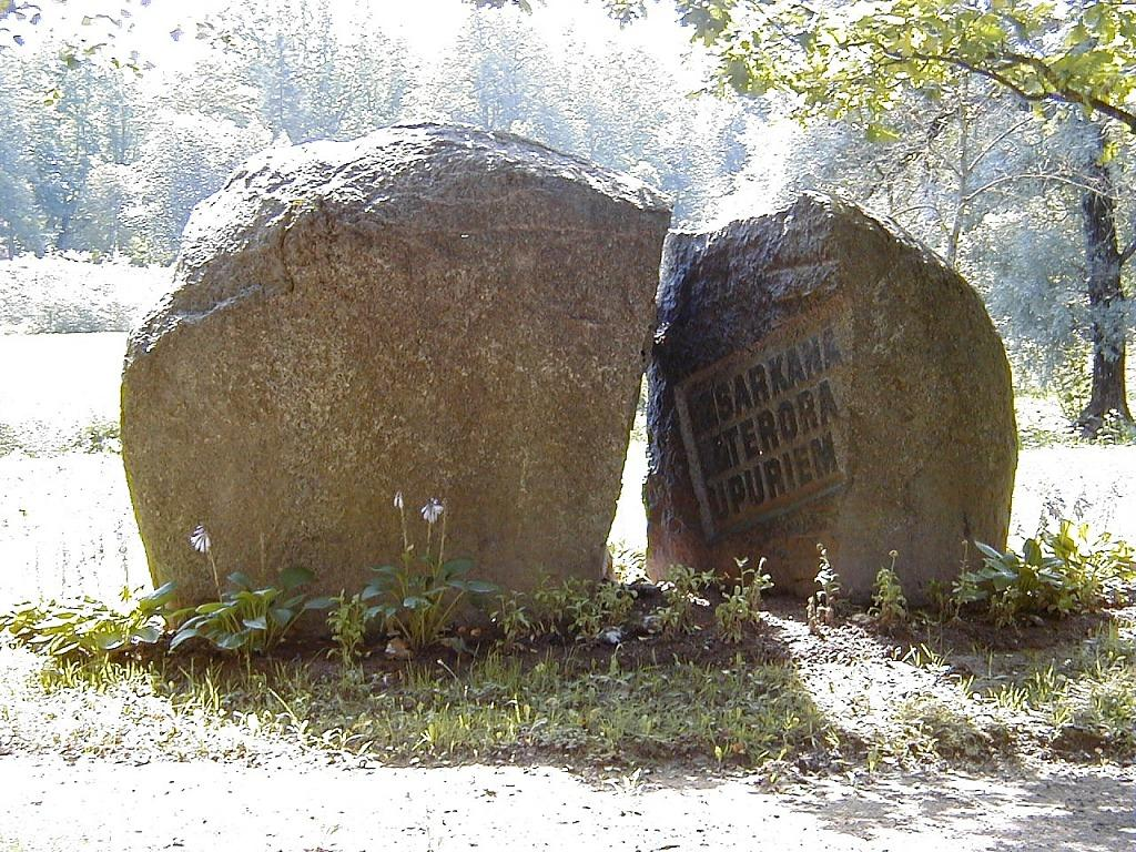 Naukšēni, piemineklis represētajiem 2000-08-05